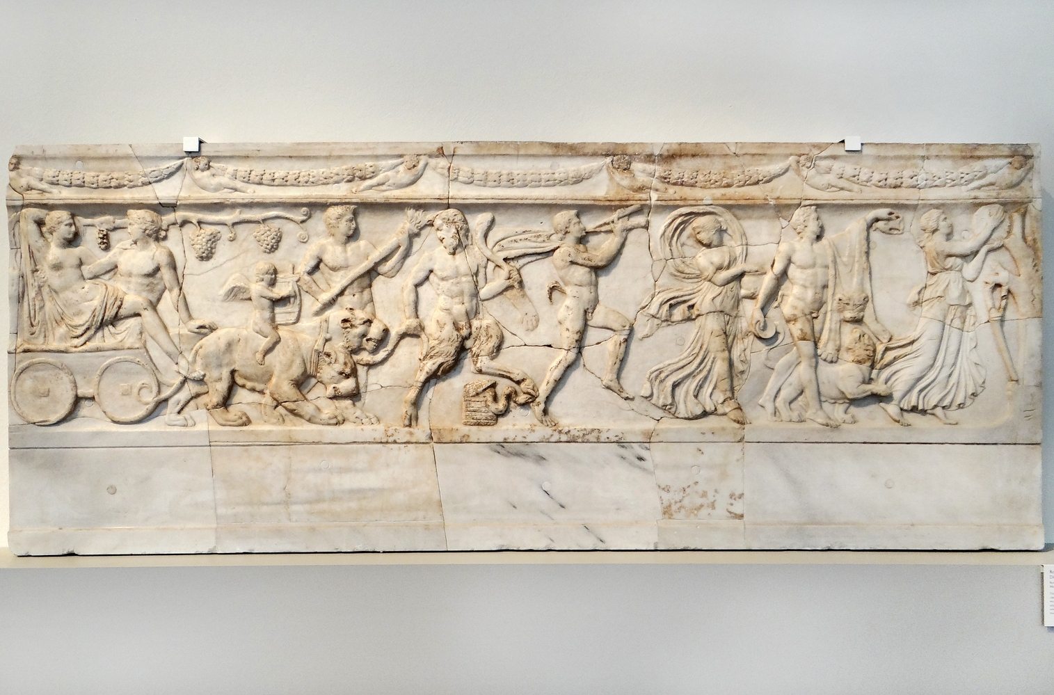 Couvercle de sarcophage : Scène du mythe de Dionysos et d'Ariane le cortège est mené par des ménades et des satyres jouant et dansant, Dionysos et Ariane sont à gauche dans un char tiré par des panthères 110-130 av. J.C. Marbre Rome, via Appia proche de la Tombe de Caecilia Metella (Italie) Altes Museum (Berlin)